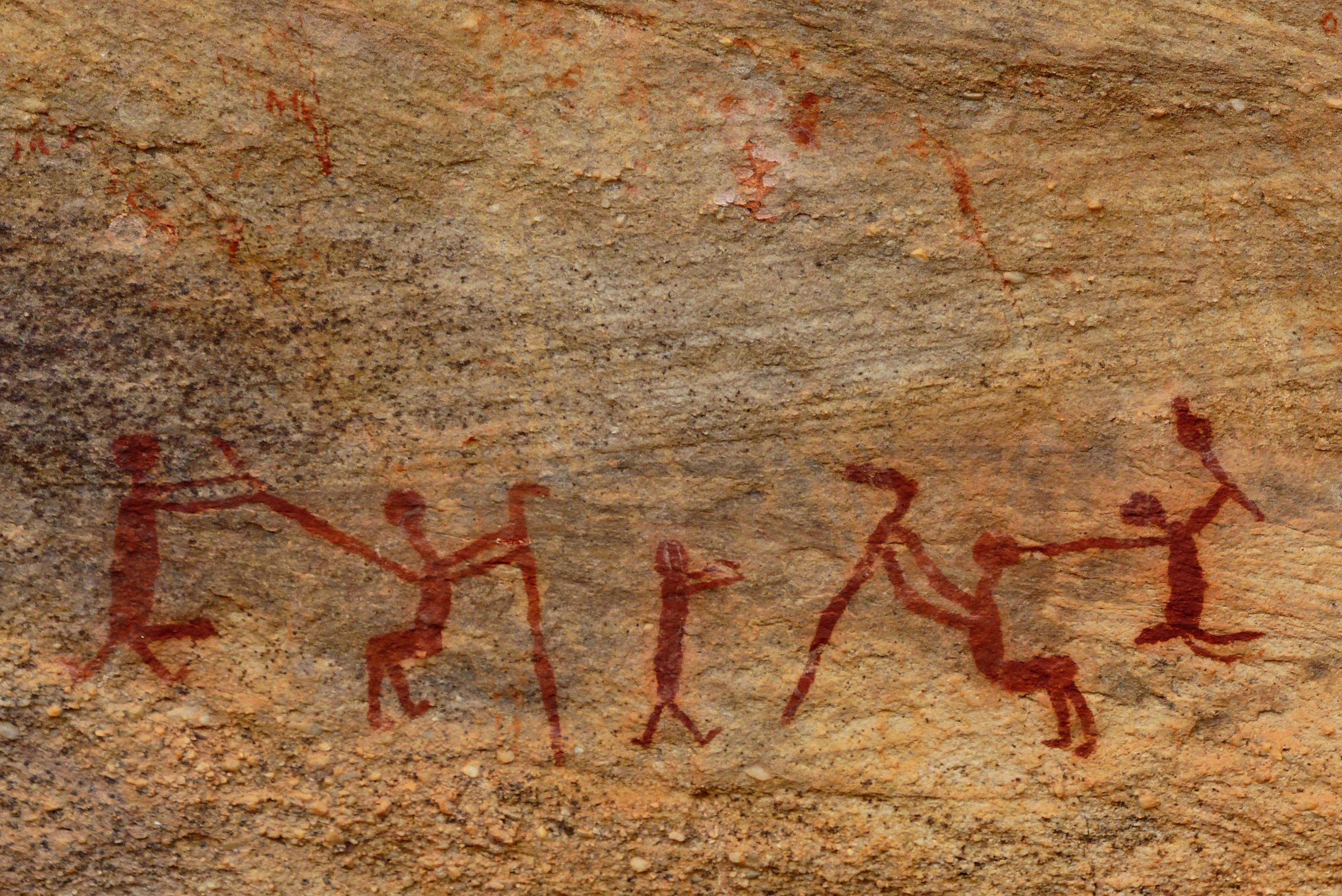 Pintura Rupestre - Serra da Capivara